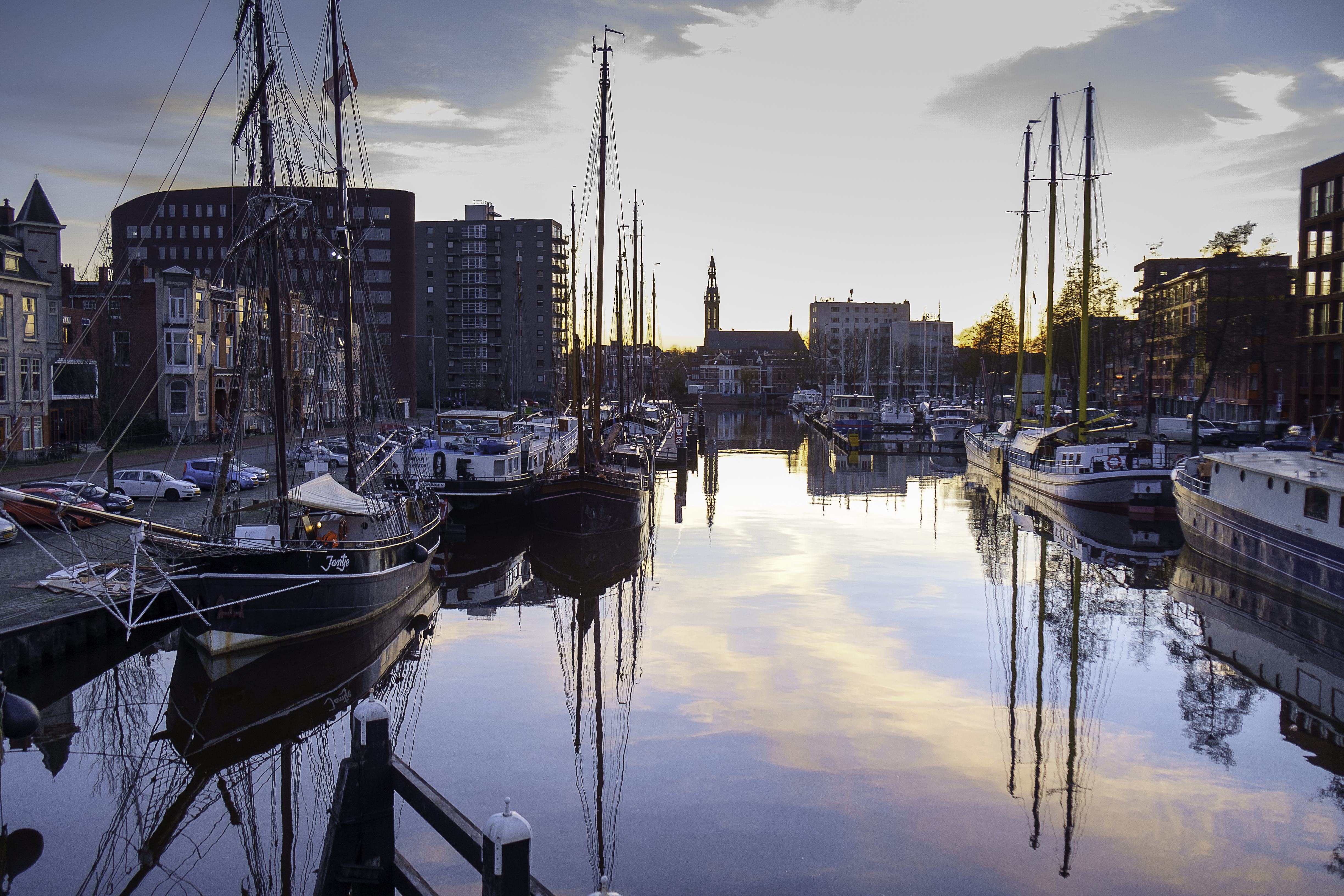 Oosterhaven vanaf de Oosterhavenbrug